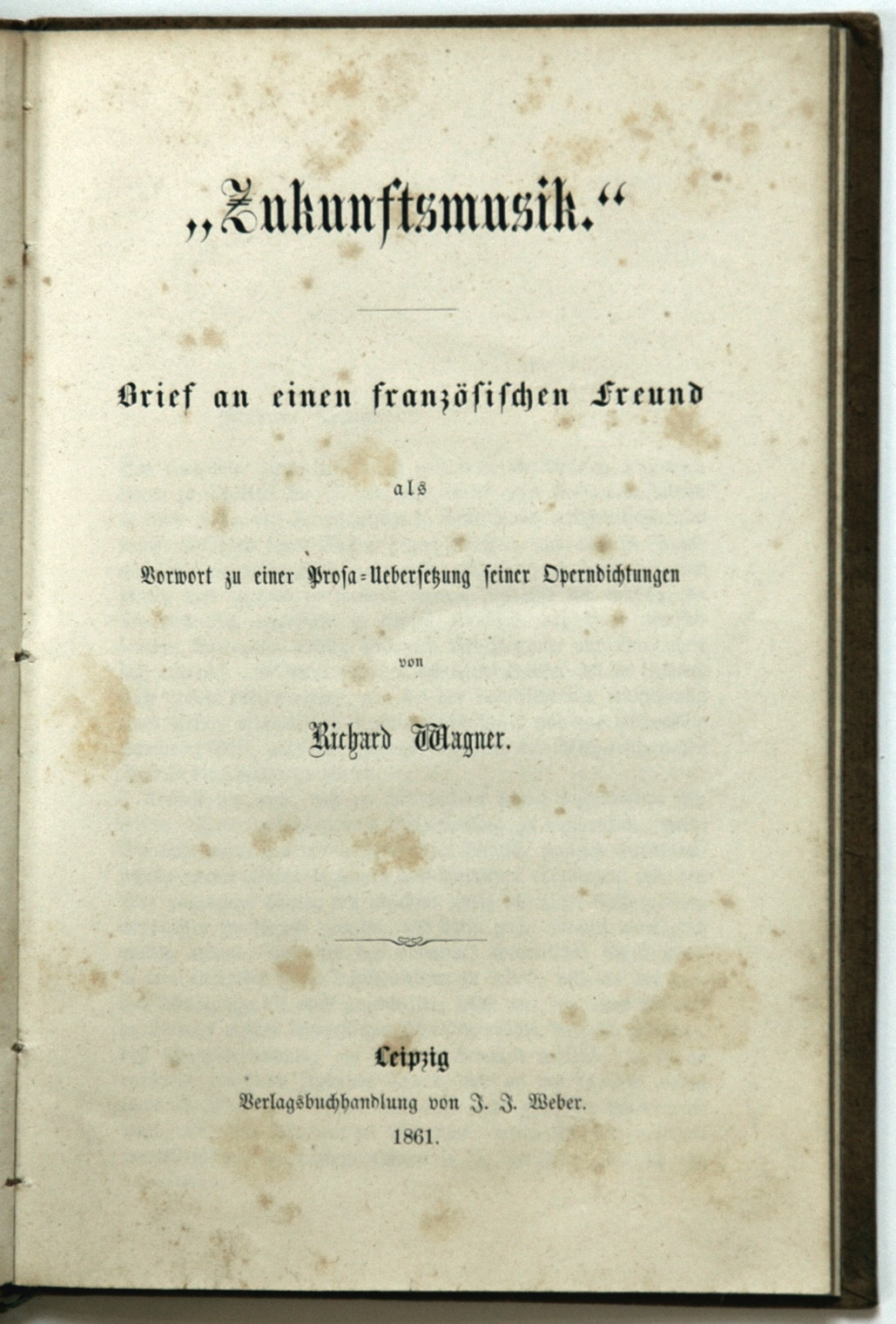 Richard Wagner, „Zukunftsmusik“, Titelblatt des Erstdruckes